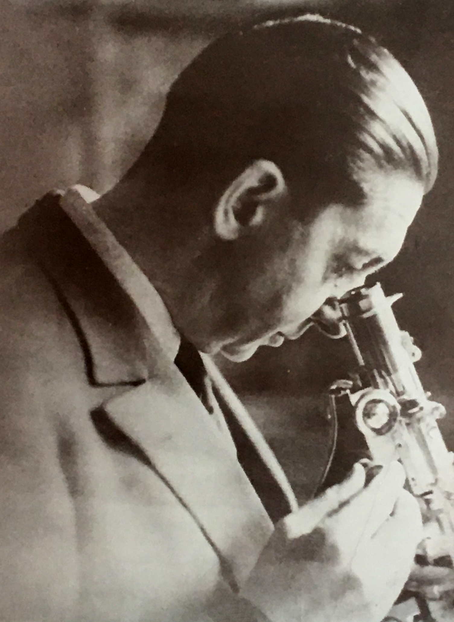 Jacques de Lapparent, titulaire de la chaire de Pétrographie à l'Université de Strasbourg, observe une plaque mince de roche au microscope polarisant